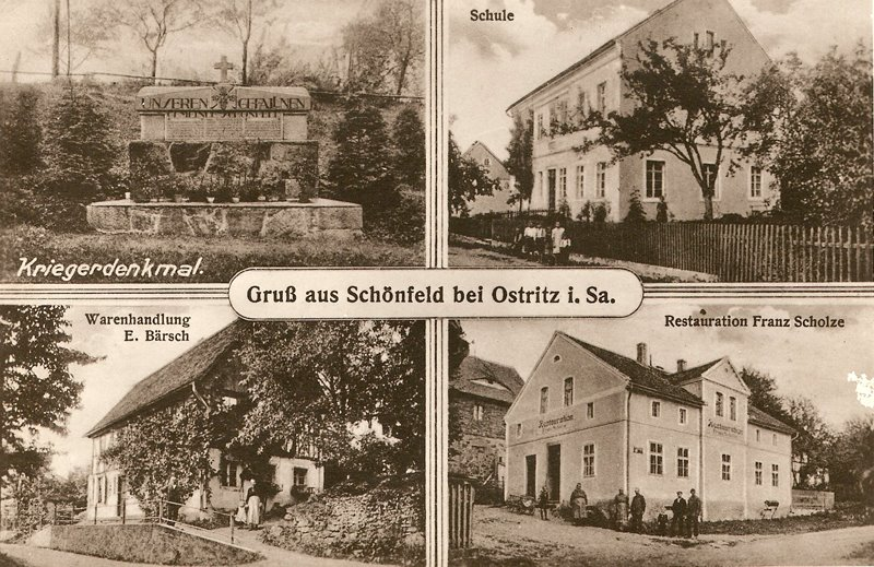 Stare Lutogniewice, po roku 1918 (Pocztówka)